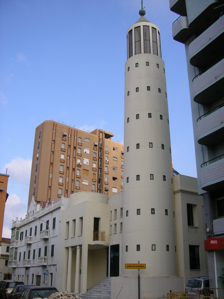 Kursaal o Centro de Congresos de Algeciras, obra de Guillermo Pérez Villalta..